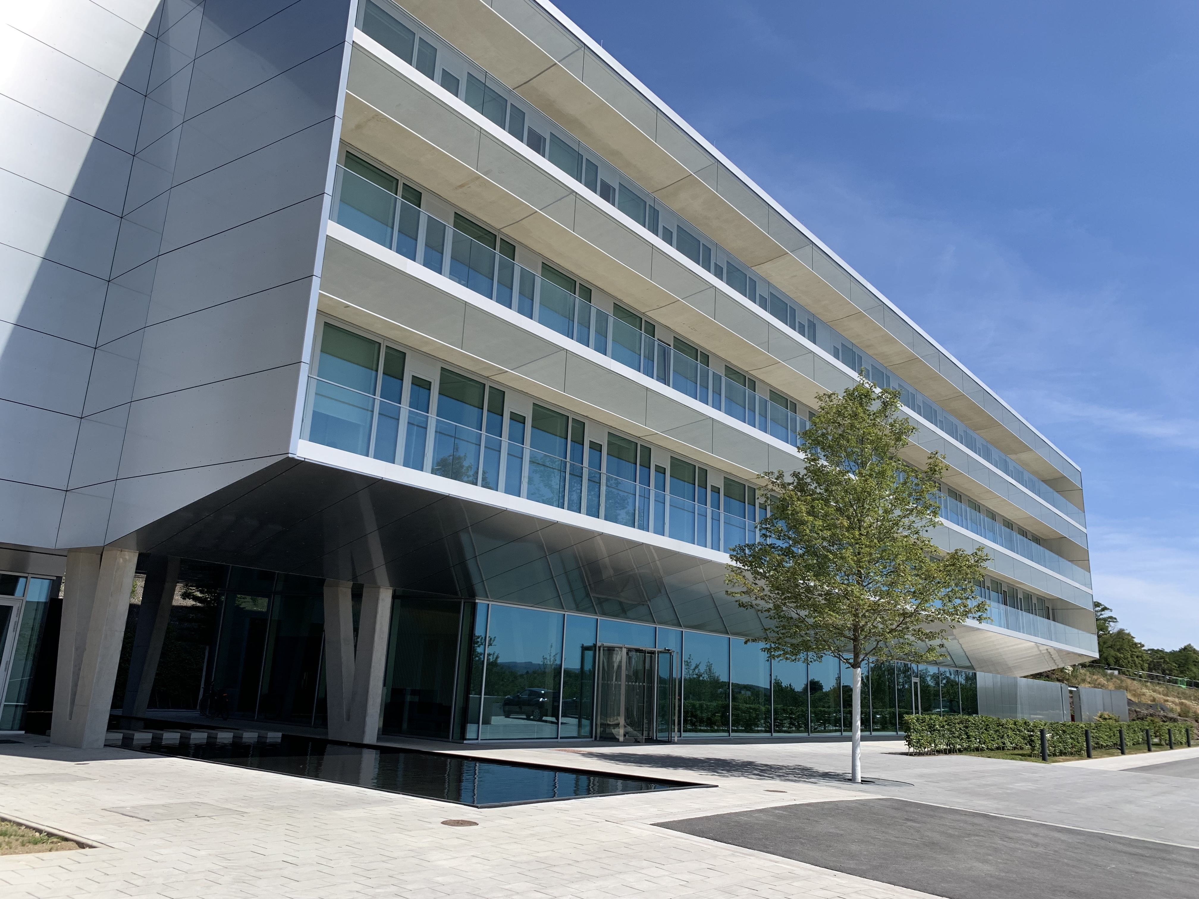 medice_verwaltung